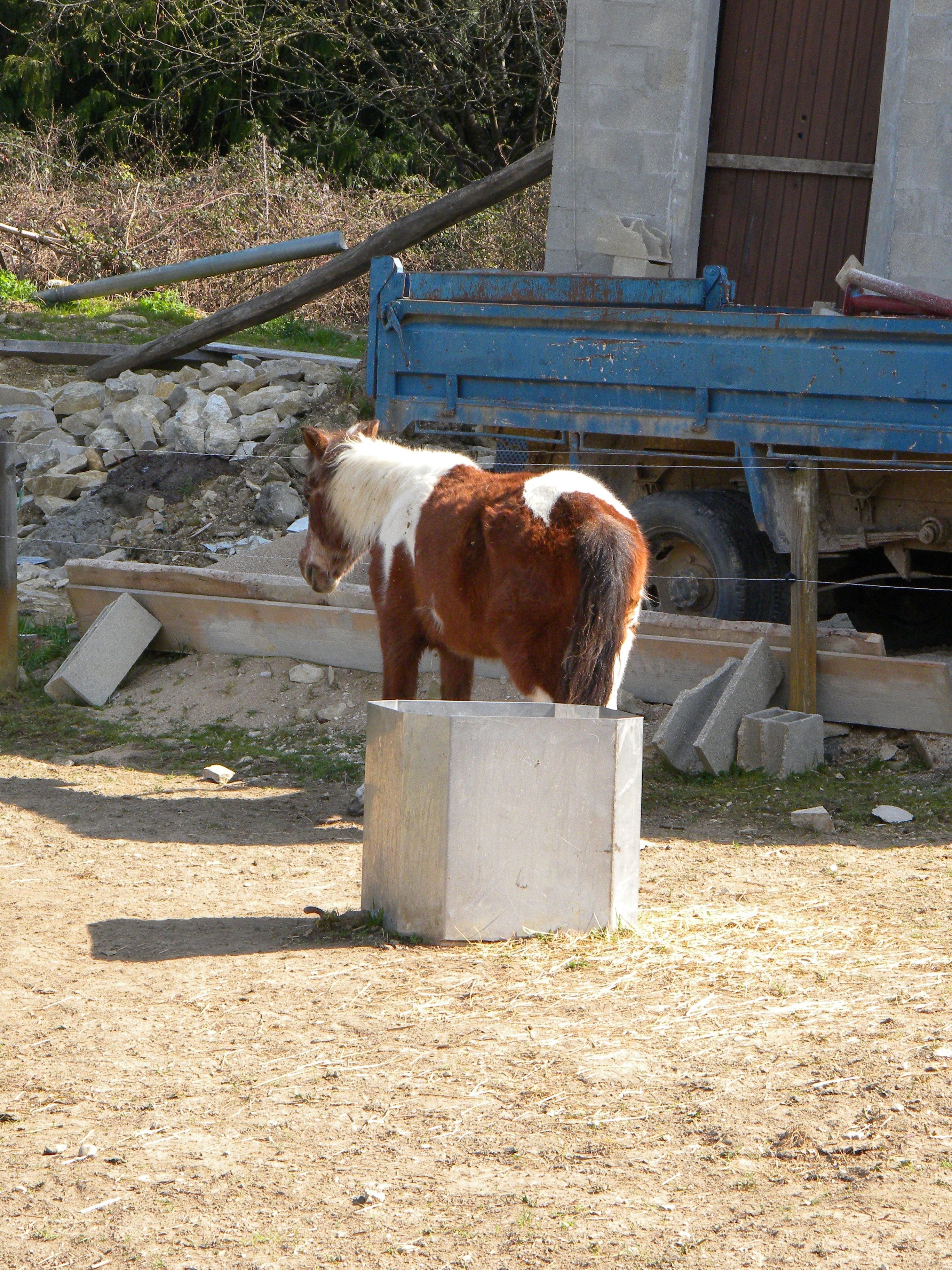 Ĉevalo